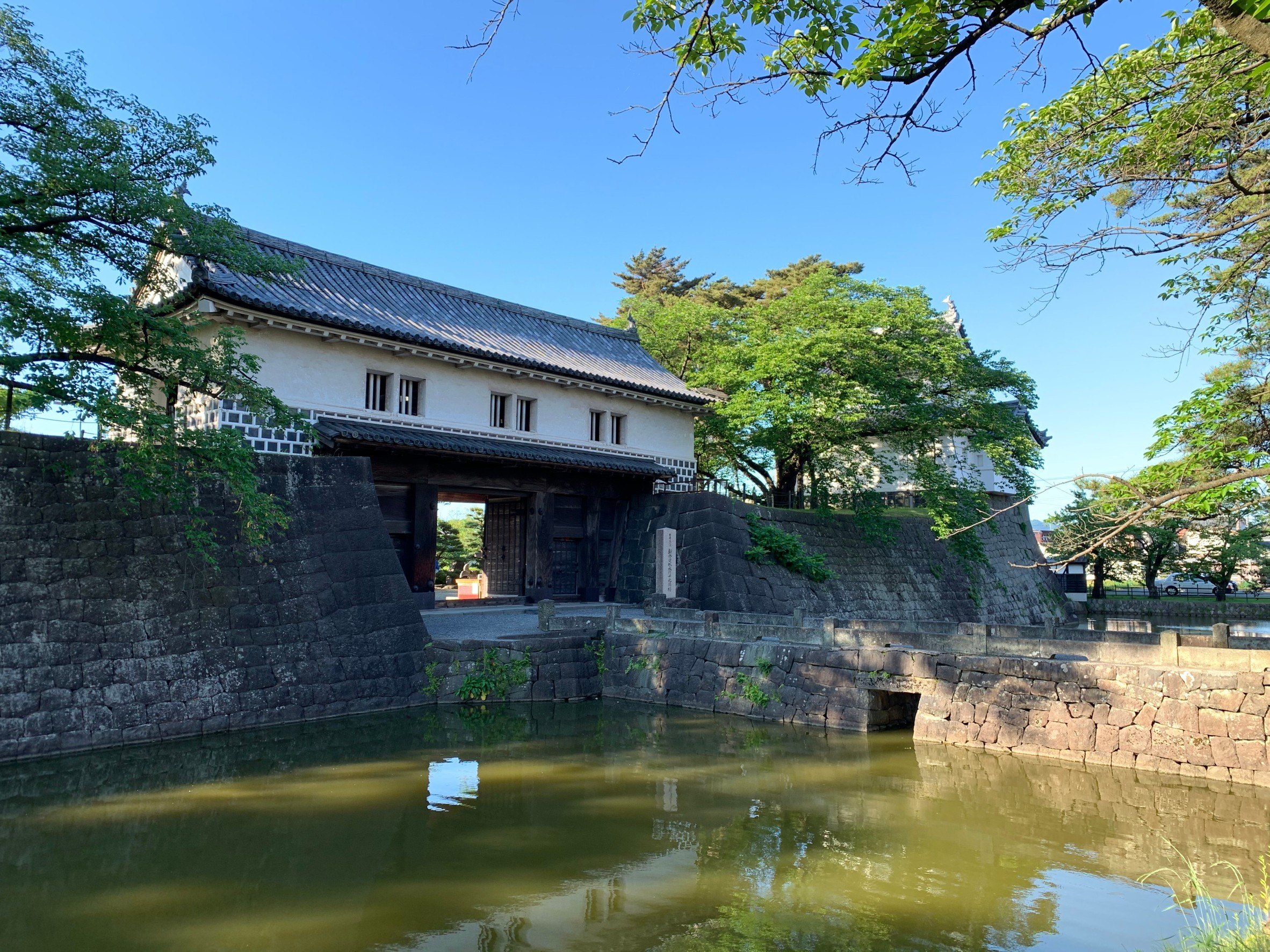 新発田城の本丸表門（2020年5月）